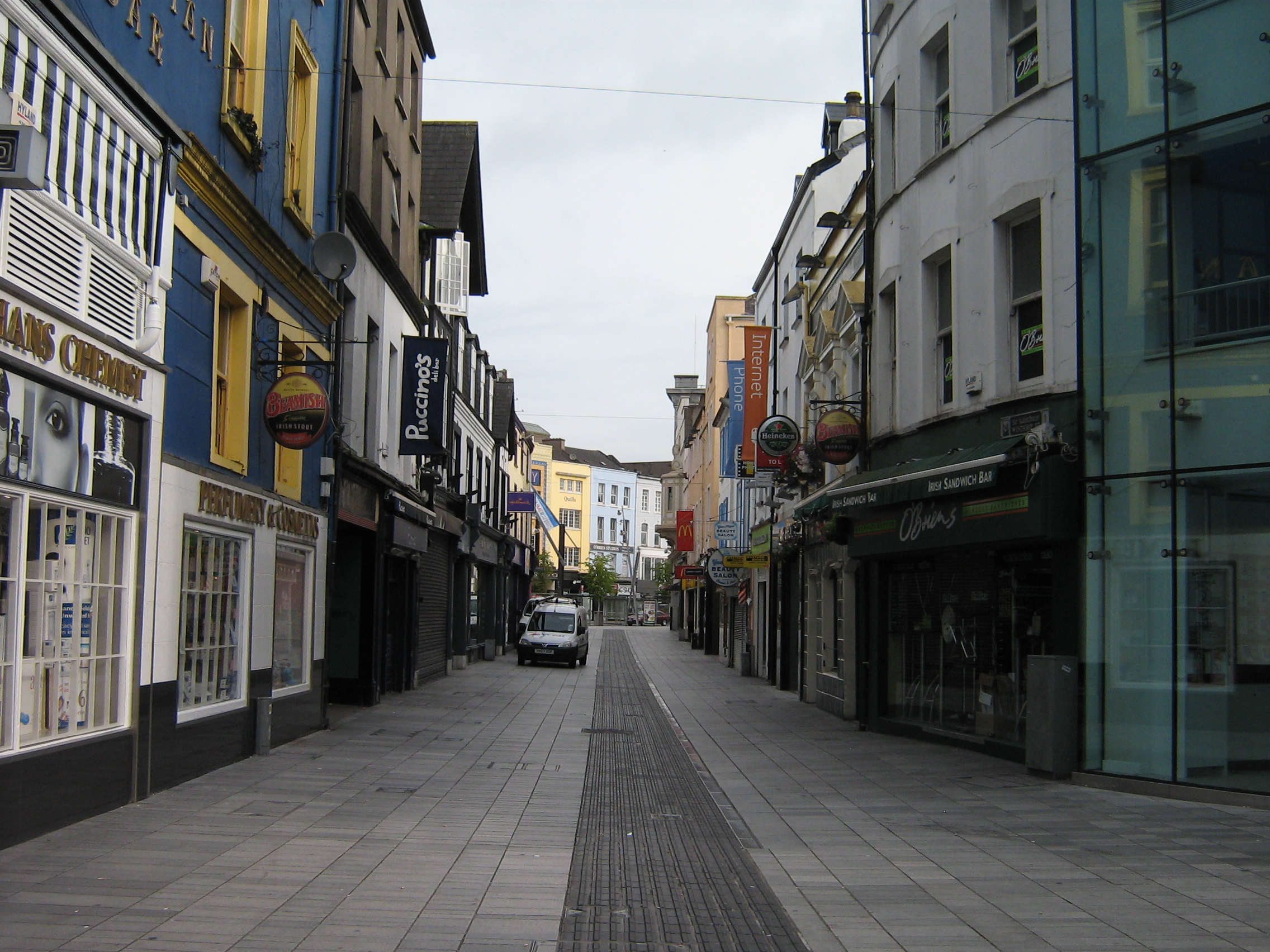 In der Fußgängerzone von Cork, Irland